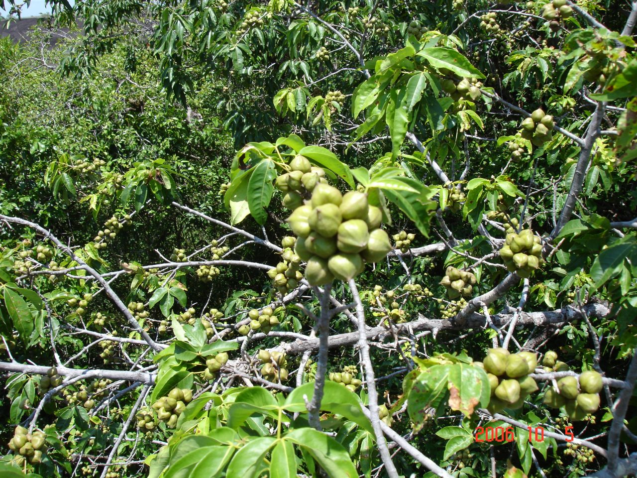 Piranhea trifoliata